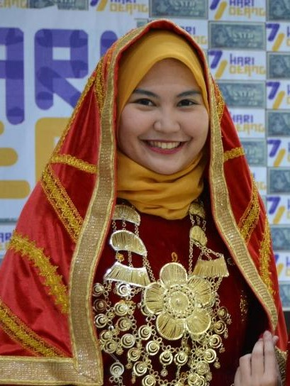 Tikuluak Koto Gadang